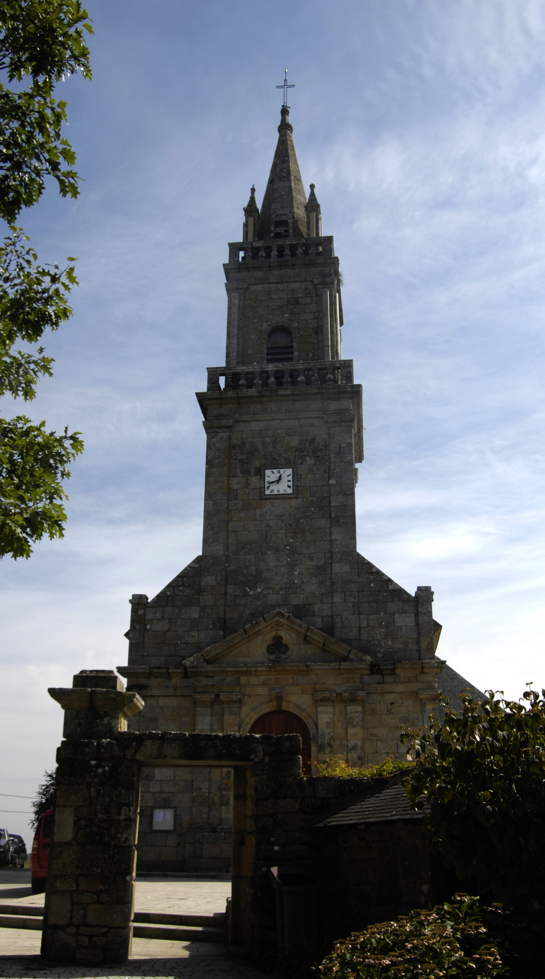 Église Saint-André de Ploemel.